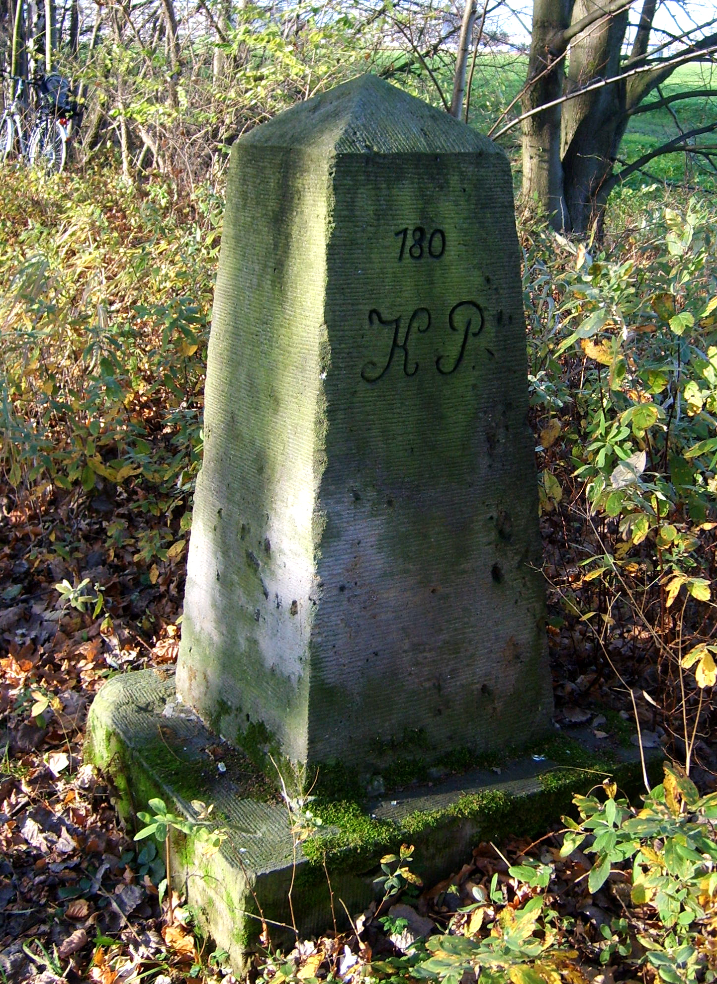 Sächsisch-Preußischer Grenzstein Nr. 180 am Elsterwerda-Grödel-Floßkanal zwischen Prösen und Gröditz.